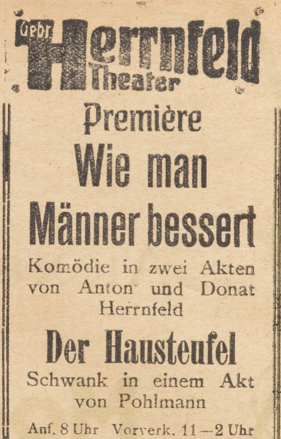 Gebrüder-Herrnfeld-Theater, Anzeige